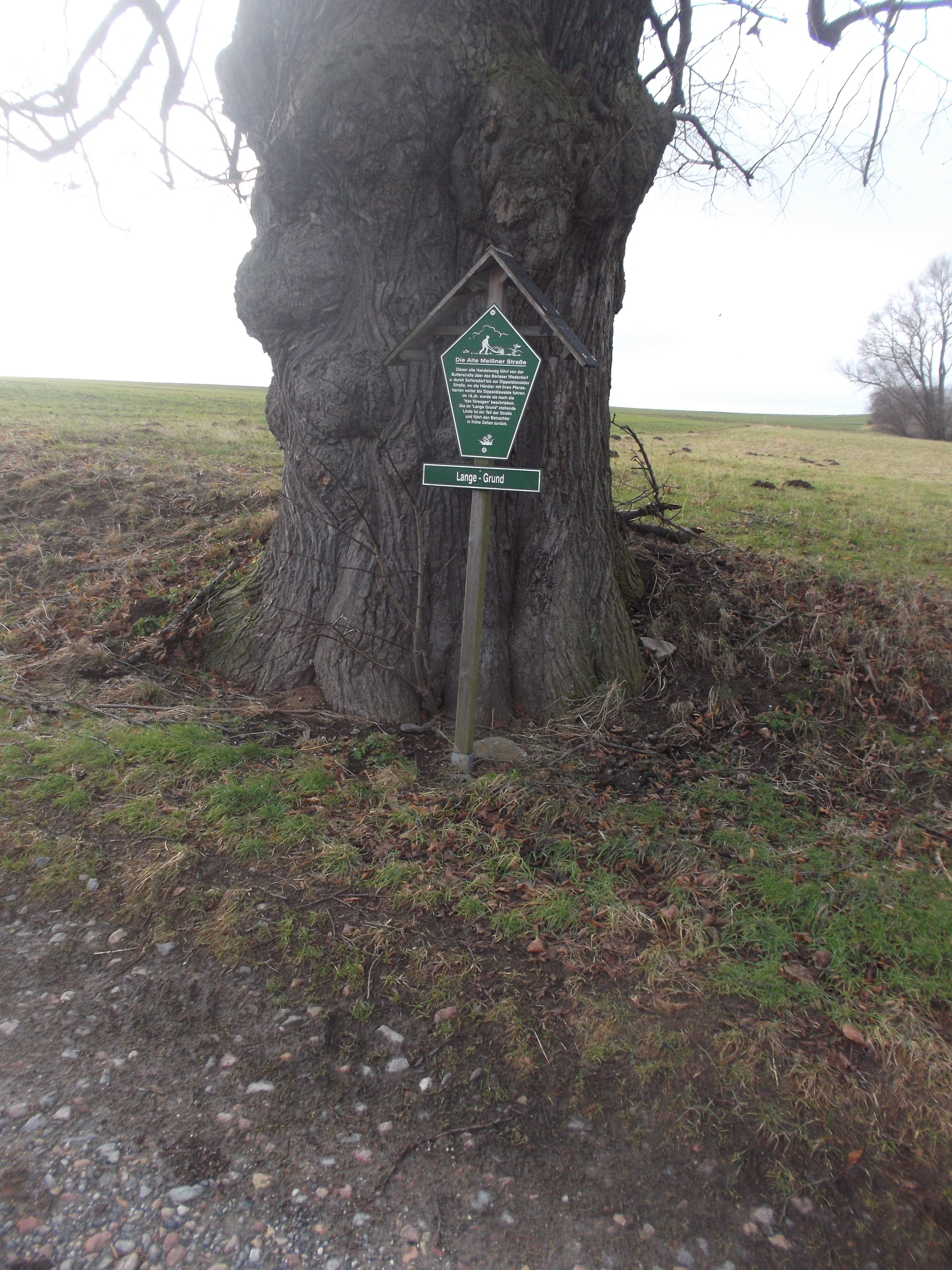 Beschreibungstafel der Alten Meißner Straße im Lange-Grund bei Seifersdorf/Dippoldiswalde